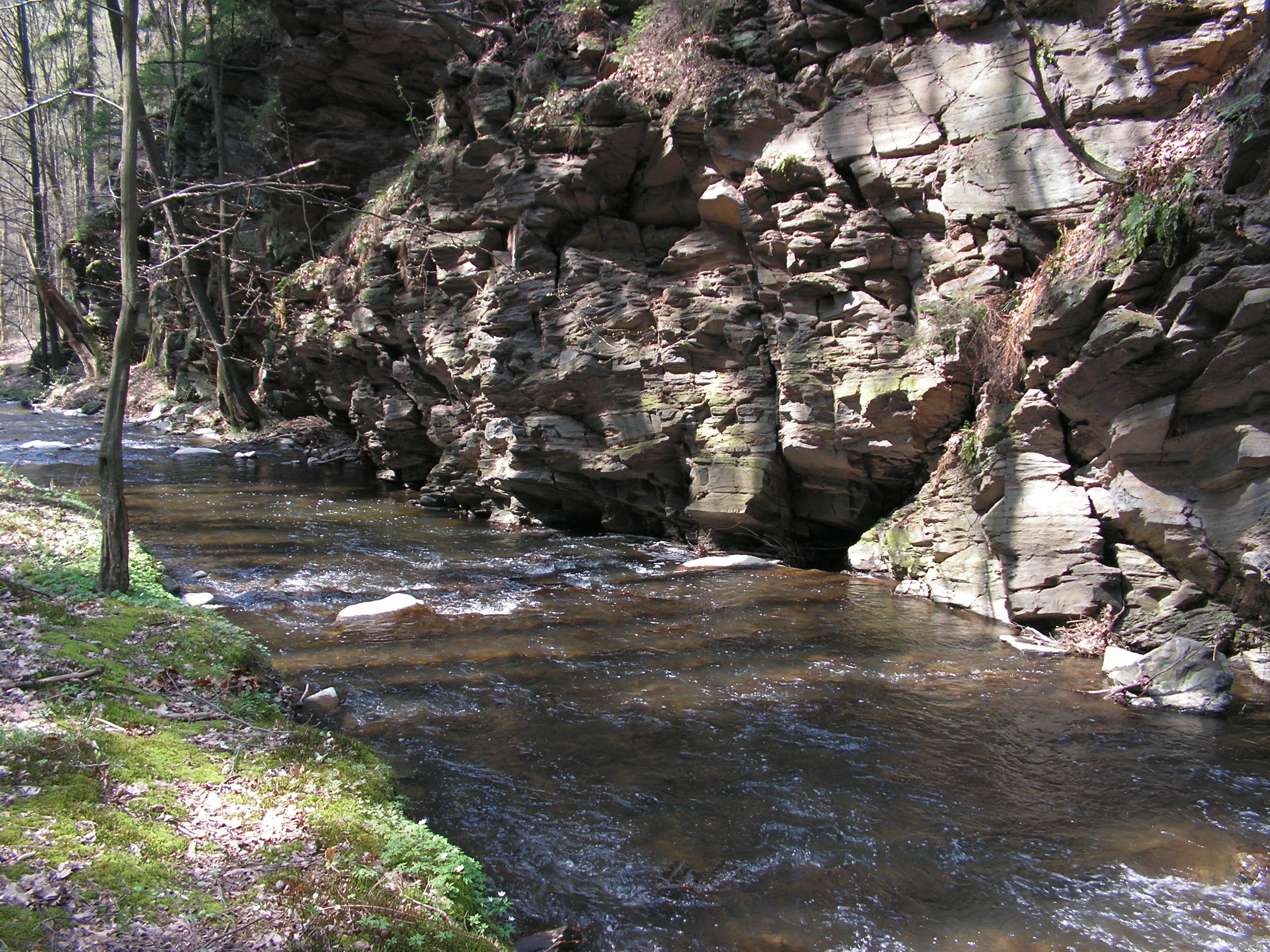 Jánský potok (Klejnárka) pod obcí Hraběšín.